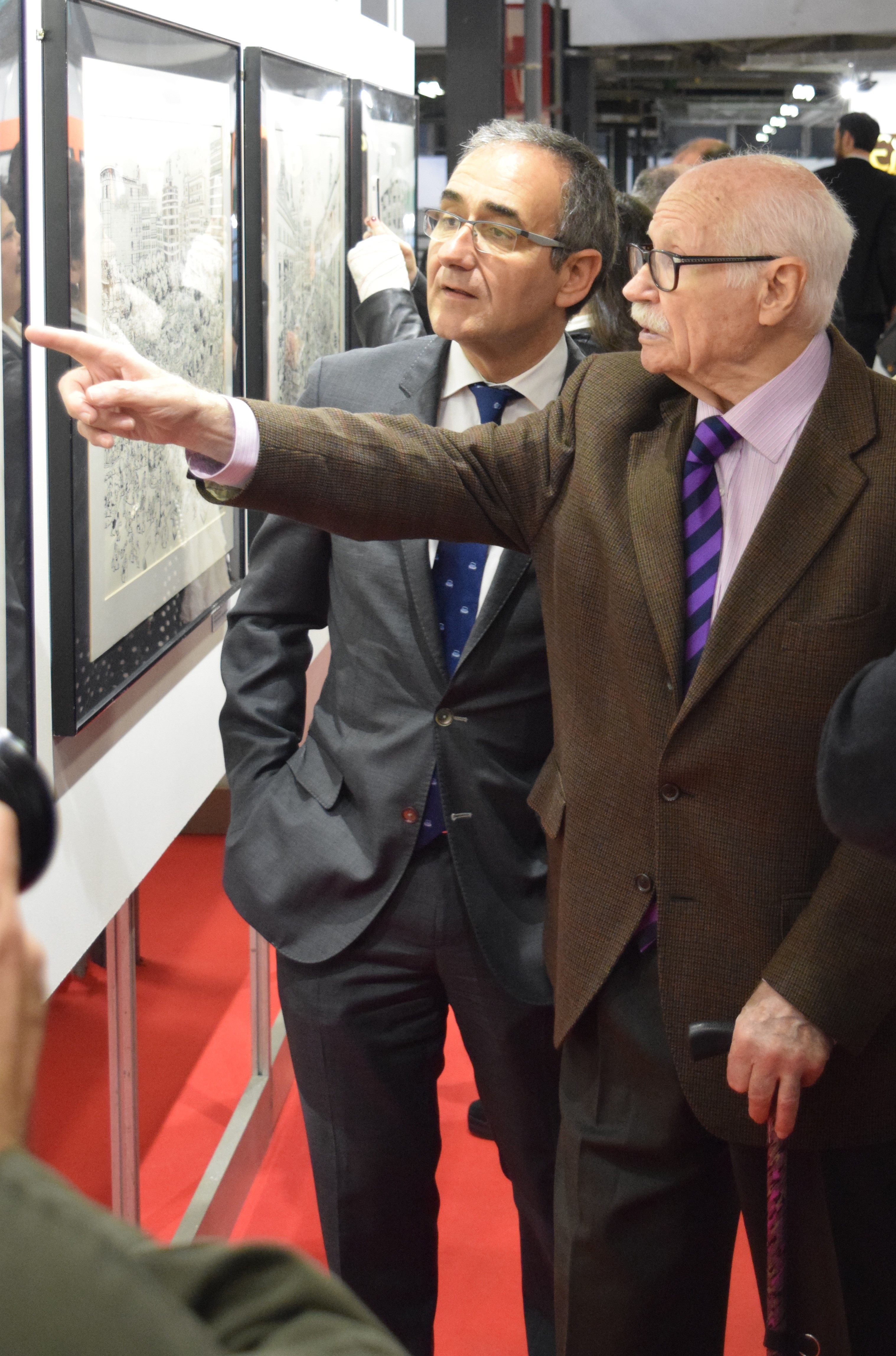 El dibuixant de còmics català Josep Maria Blanco mostrant la seva exposició a Patrici Tixis, president de Ficomic. Saló Internacional del Còmic de Barcelona de 2017. Dijous 30 de març de 2017.